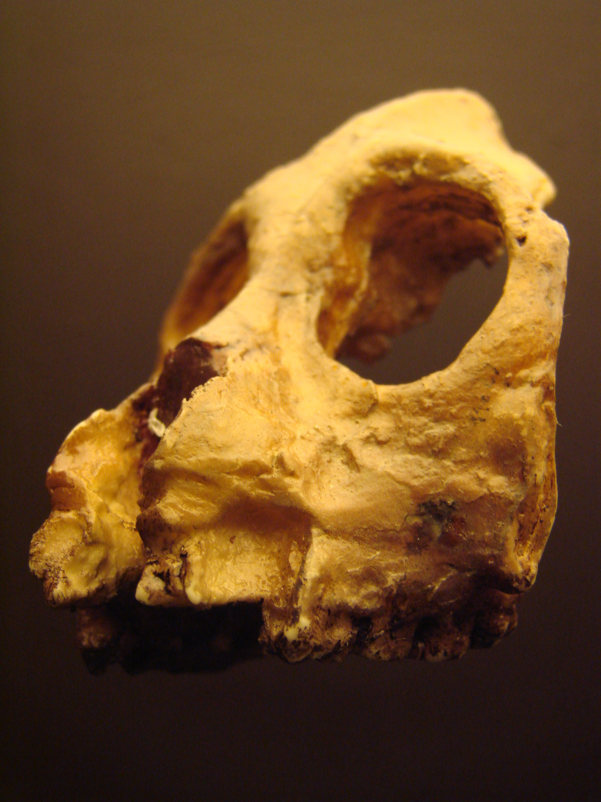 Muséum d'Anthropologie, campus universitaire d'Irchel, Université de Zurich (Suisse) : Aegyptopithecus